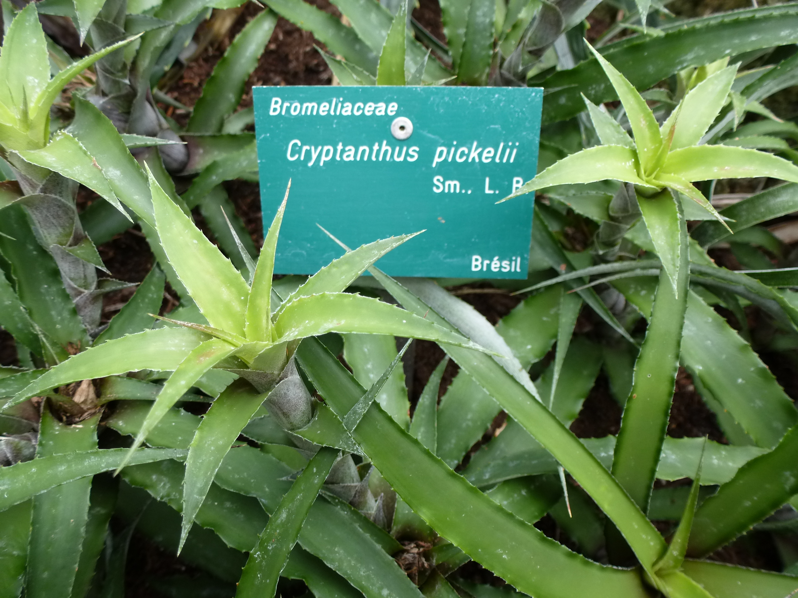 Cryptanthus pickelii - Serres d'Auteuil - Jardin botanique de la Ville de Paris - France